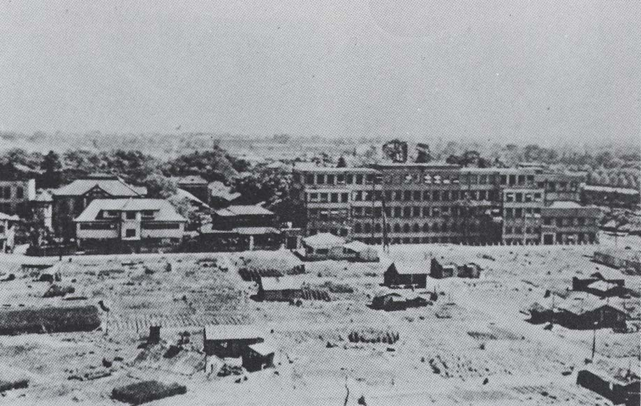 昭和20年4月の大空襲で焼け野原となった大学周辺